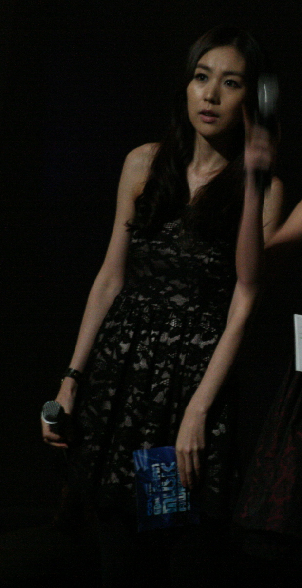 2009 엠넷 아시안 뮤직 어워드